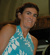 Atleta do vôlei de areia Shelda Bedê homenageada na ALERJ